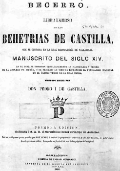 Libro del Becerro de las Behetrías, portada de la edición de 1886